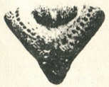 中文（台灣）: 繩文前期的土偶